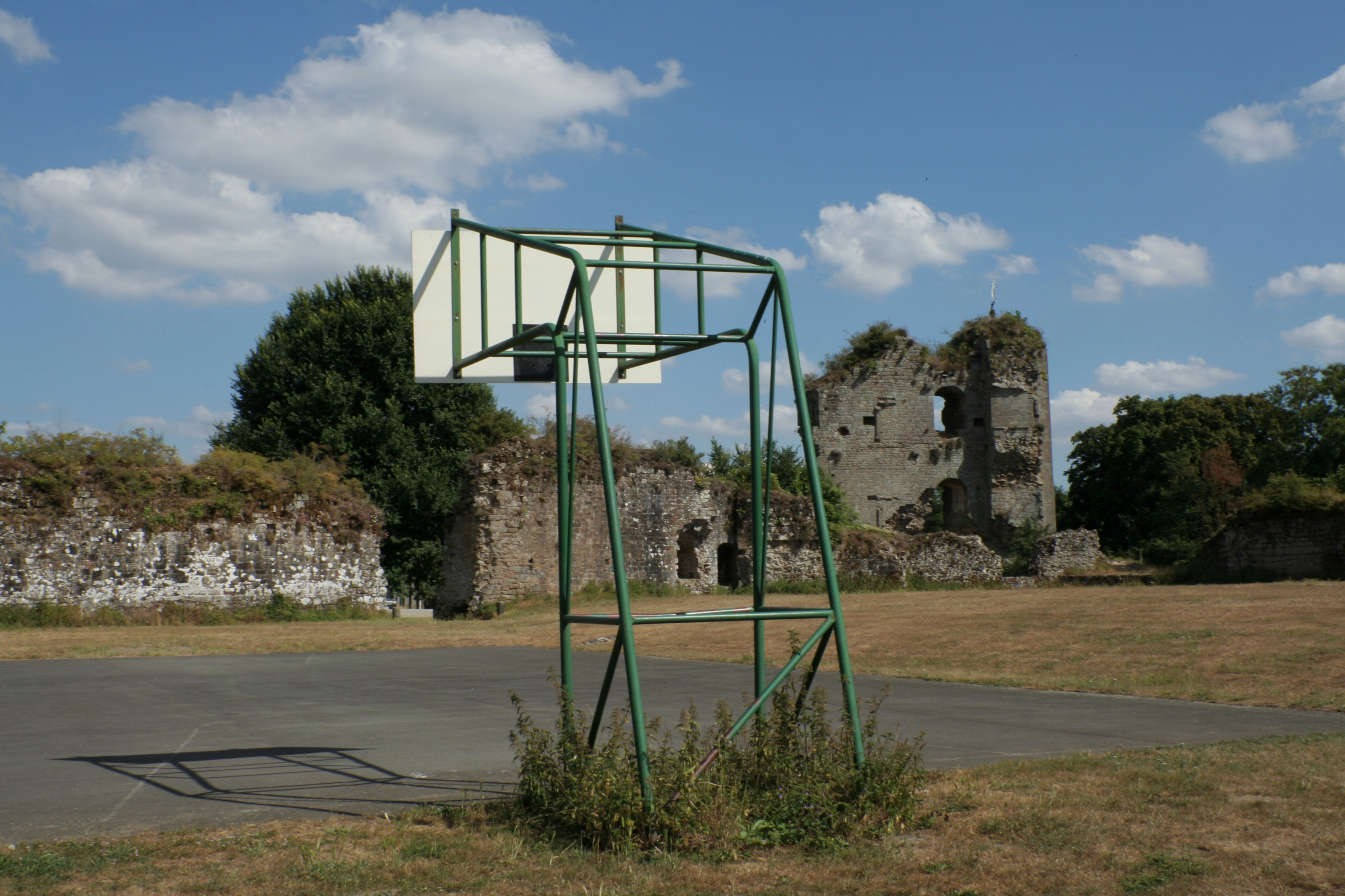 Hédé, Ille-et-Vilaine, Bretagne, France Panier de basketball dans le château, vues de l'intérieur.